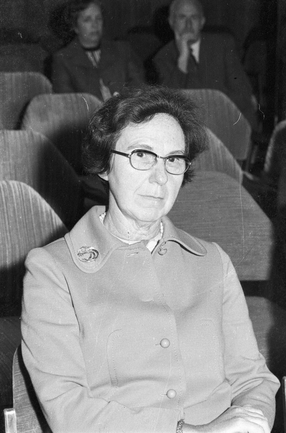 Die stellvertretende Vorsitzende der Deutschen Angestellten Gewerkschaft spricht im Rahmen der Woche der Angestellten im Hotel Conti-Hansa.